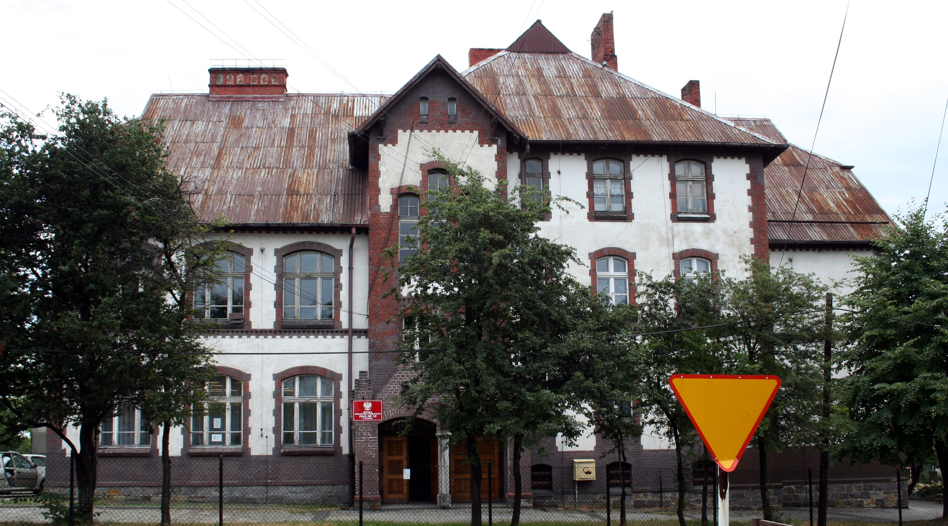 Biblioteka miejska w Rybniku Niedobczycach